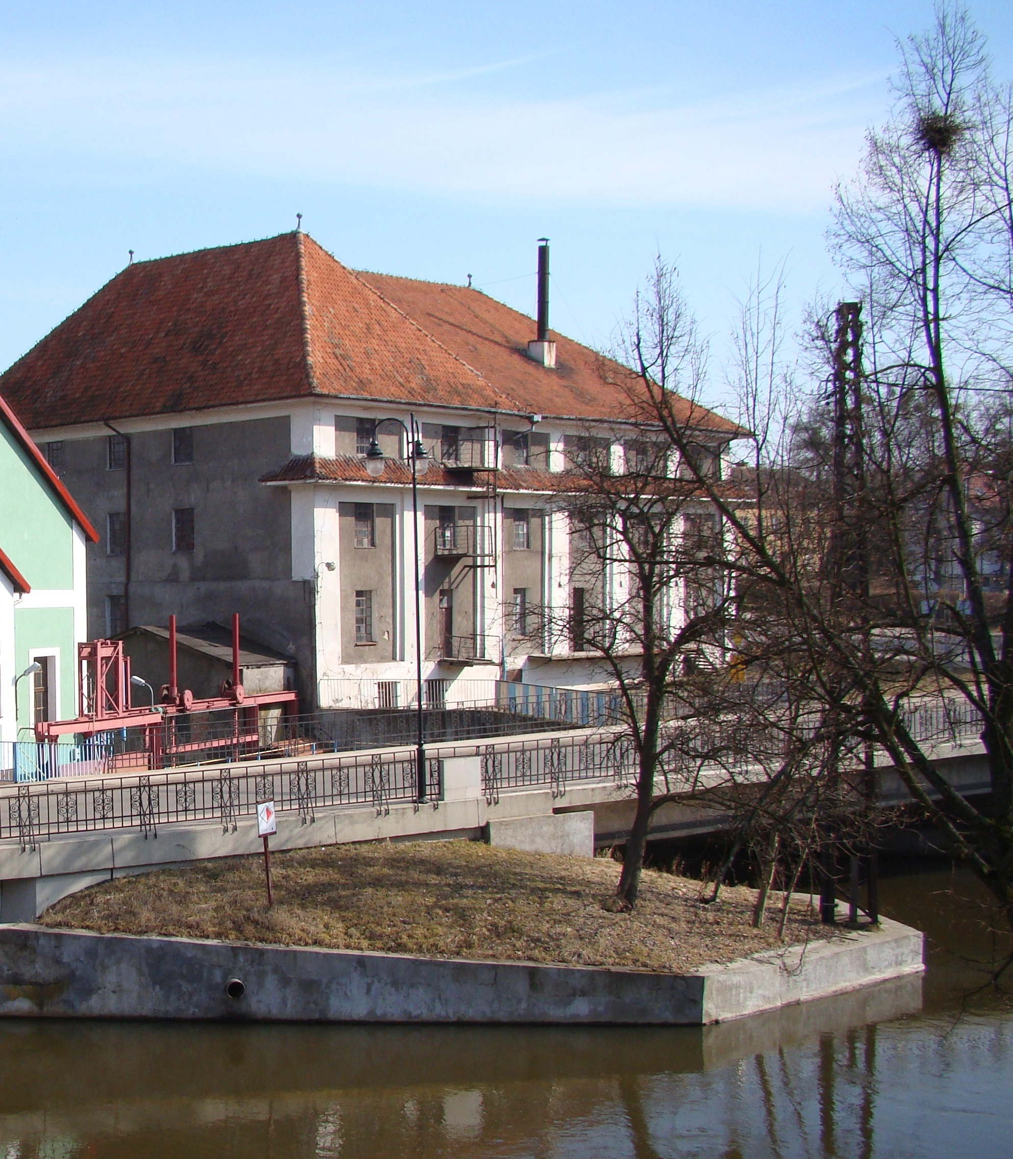 Lidzbark Warmiński, Plac Młyński 5 - budynek dawnego młyna - kaszarni wraz z działką, 1915 (zabytek nr A-4414 i 2257 z 25.05.2006)